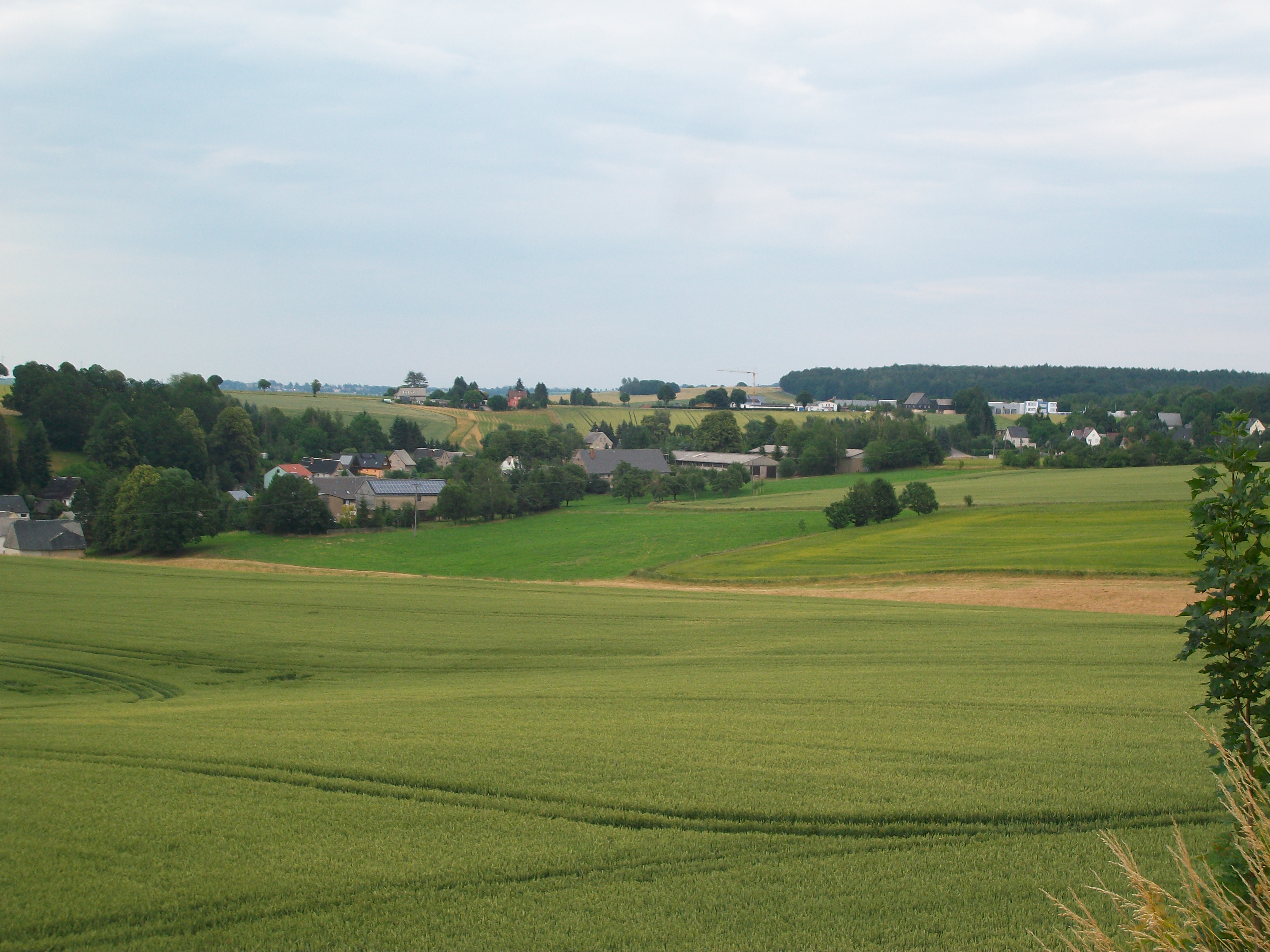 Blick auf Grumbach (Callenberg)